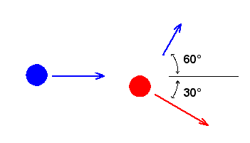 botsing tussen 2 biljartballen